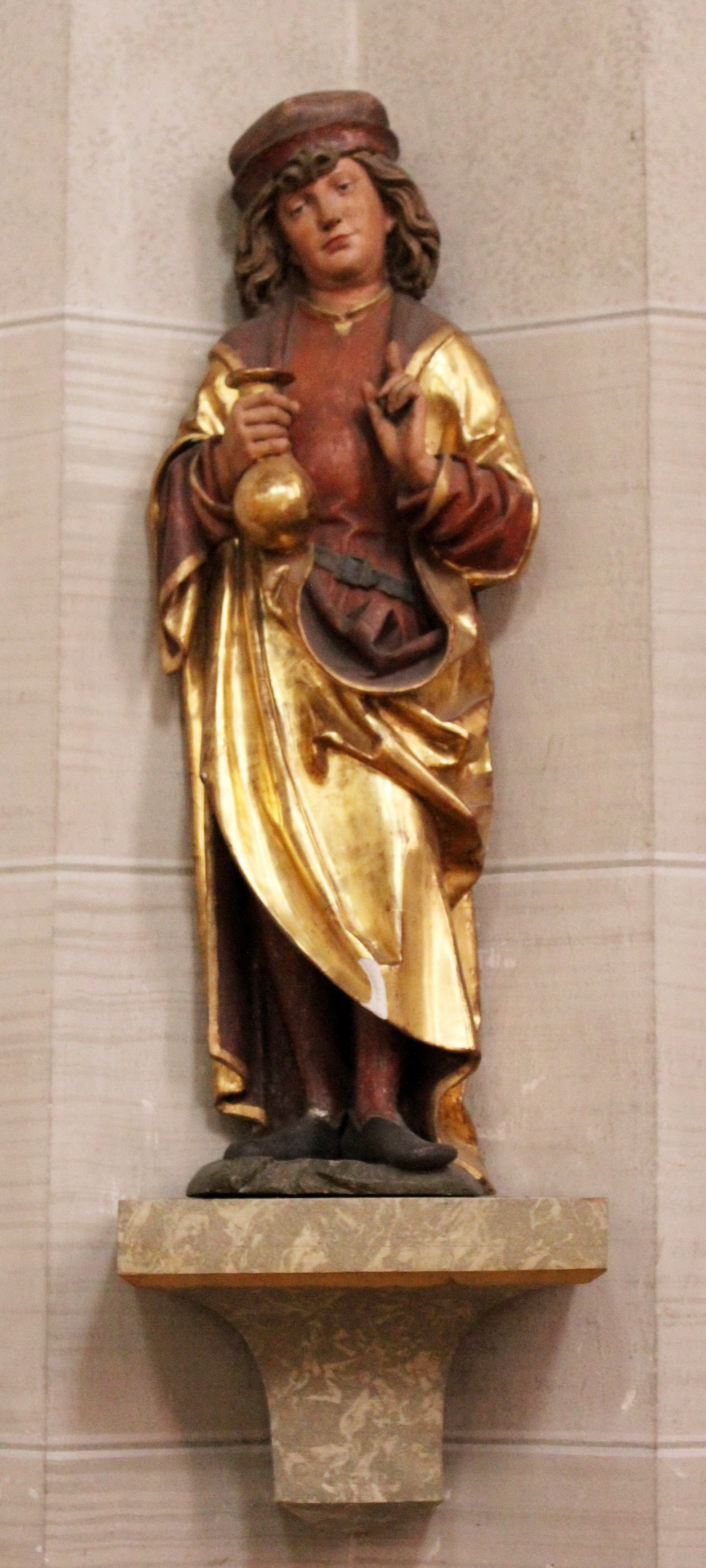 Der stehende, jugendliche Hl. Damian (98 cm hoch) mit flacher Kappe und reichem Lockenhaar hält in der Rechten eine Flasche vor der Brust. Vermutlich von Jörg Syrlin d. J. aus Ulm ca 1490.